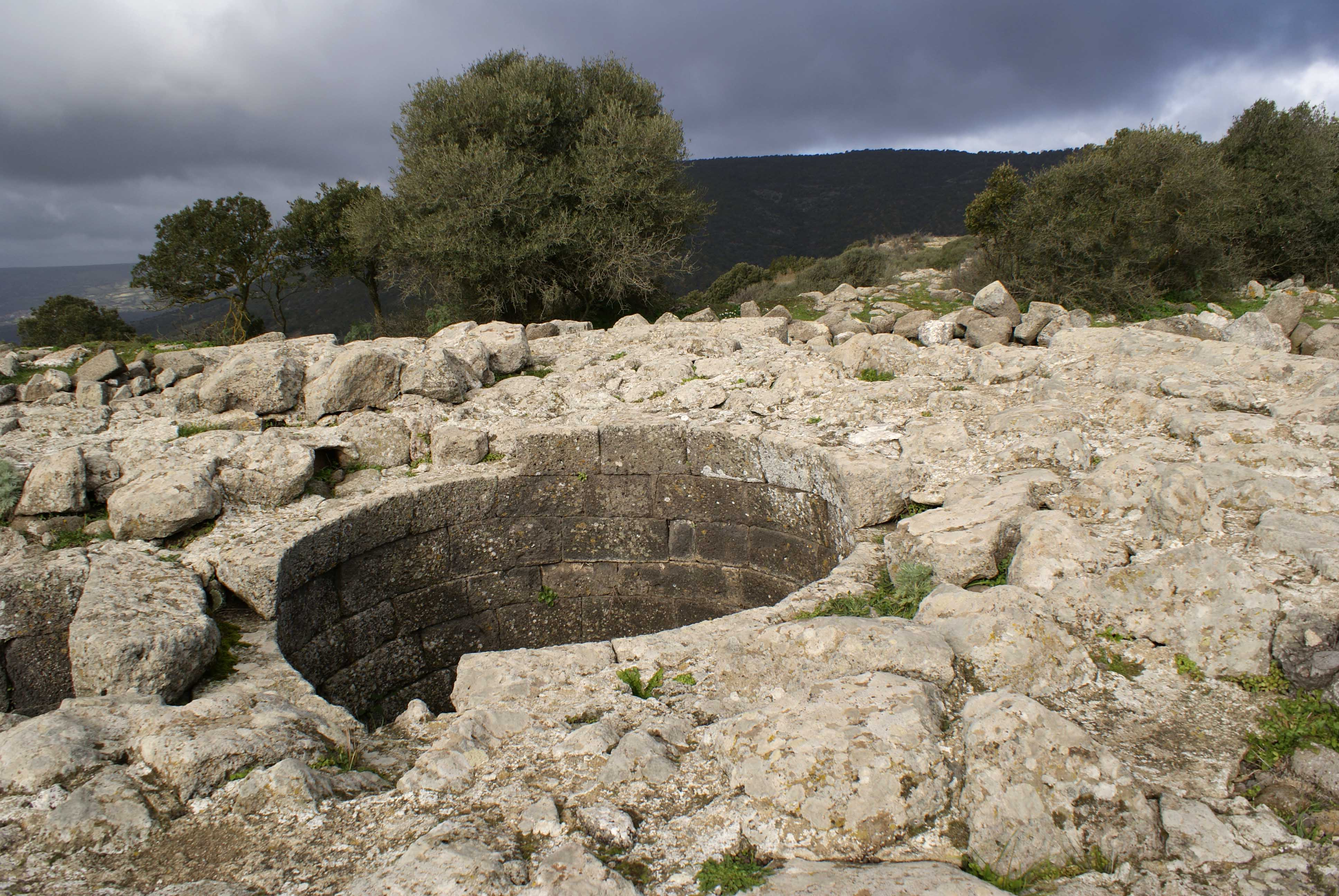 area archeologica "Santa Vittoria" Serri - Sardegna This is a photo of a monument which is part of cultural heritage of Italy.